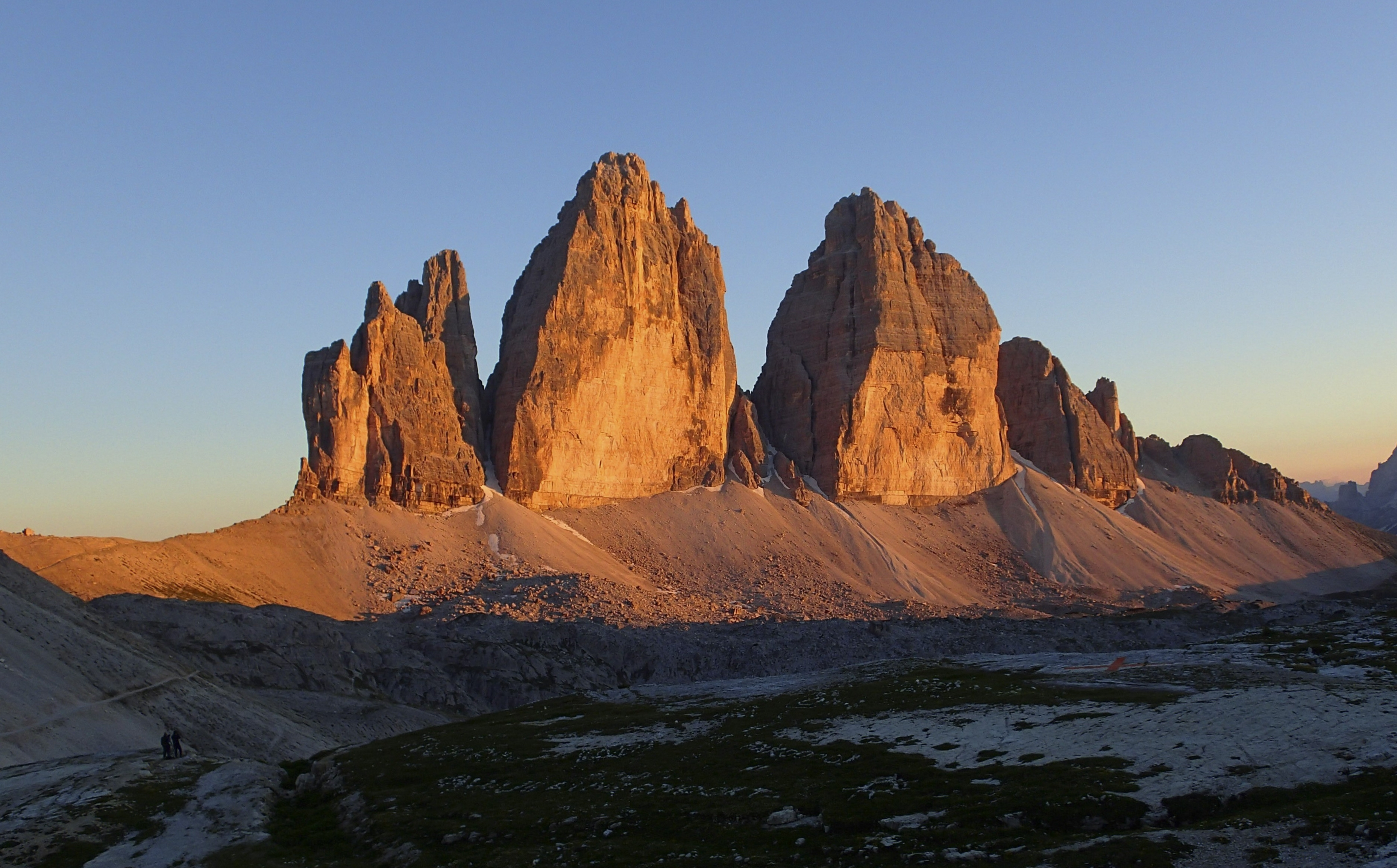 Sonnenuntergang mit Blick auf die Drei Zinnen